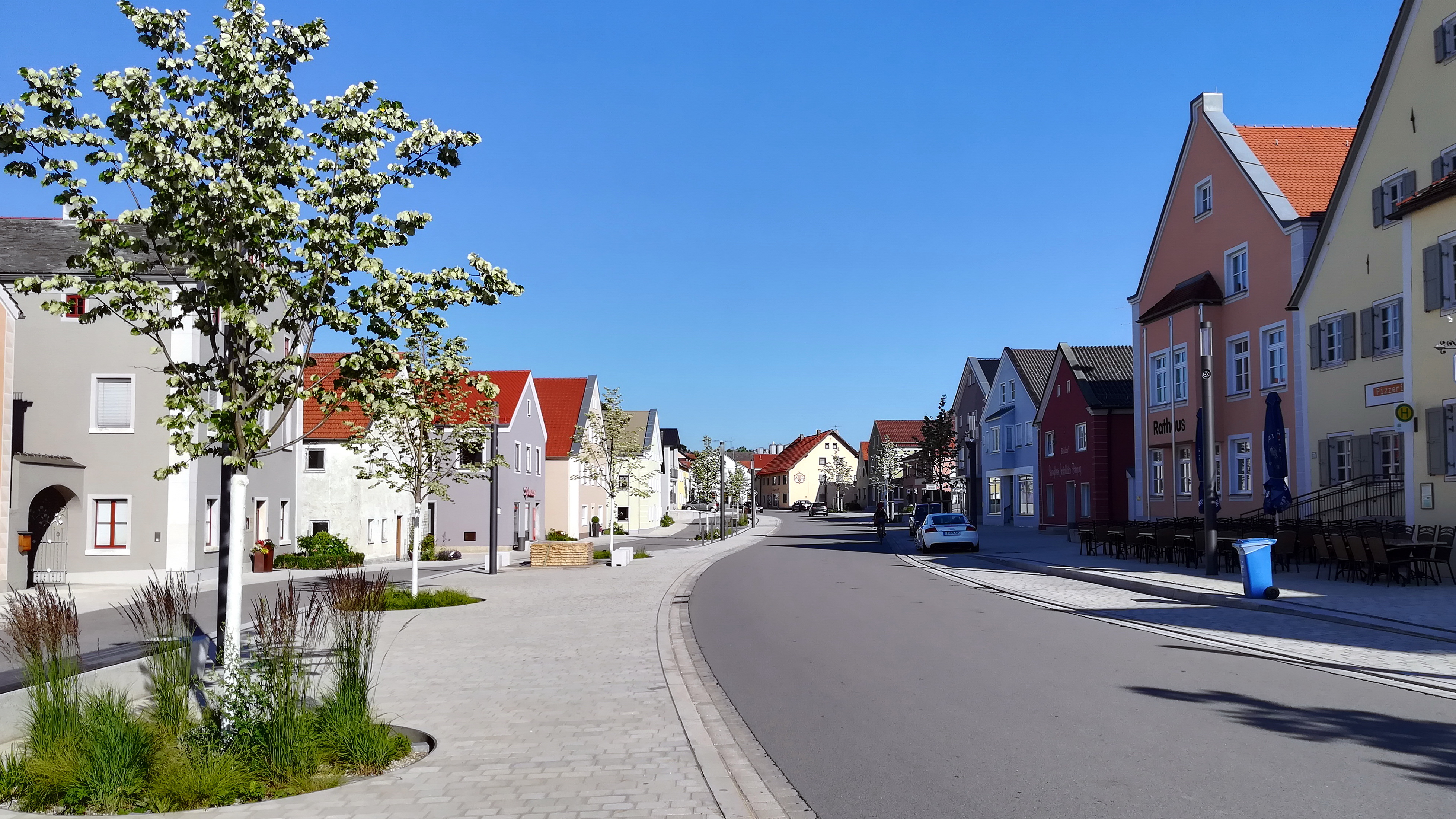 Marktplatz von Painten